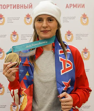 Российская конькобежка Наталья Воронина